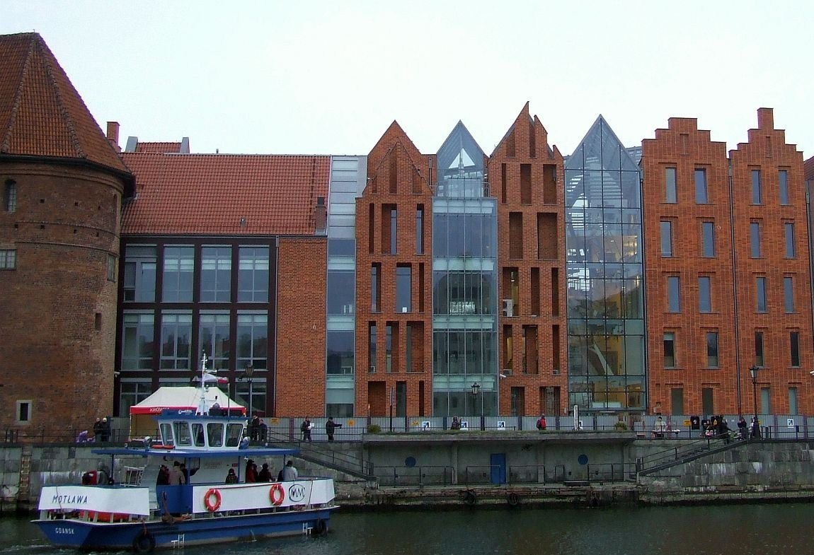 Gdańsk Centralne Muzeum Morskie